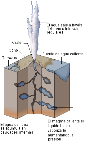 Autor: Usuario:Lmb